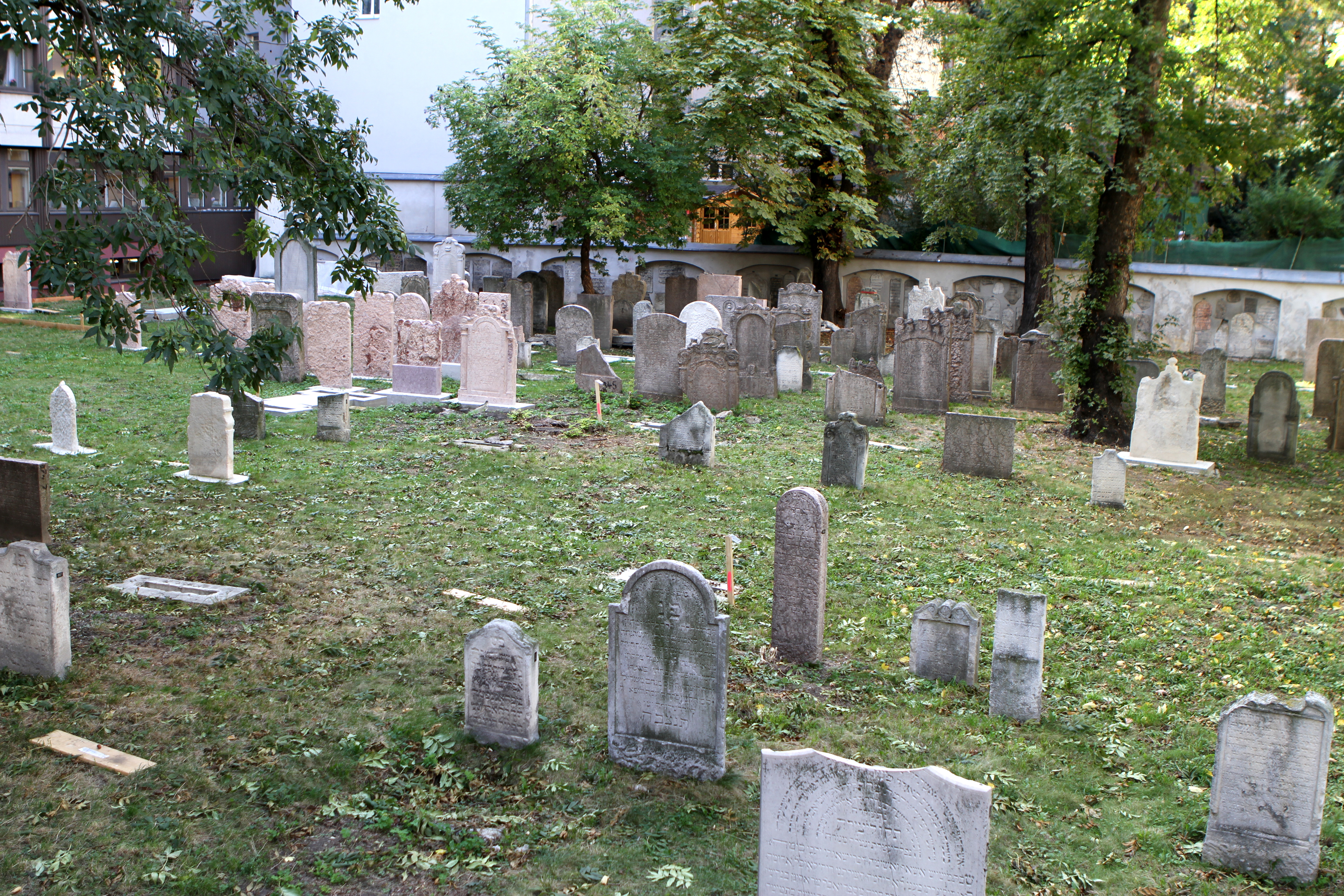 Jüdischer Friedhof Seegasse Dieses Bild wurde anlässlich des österreichischen Tags des Denkmals 2012 in Wien eingereicht.